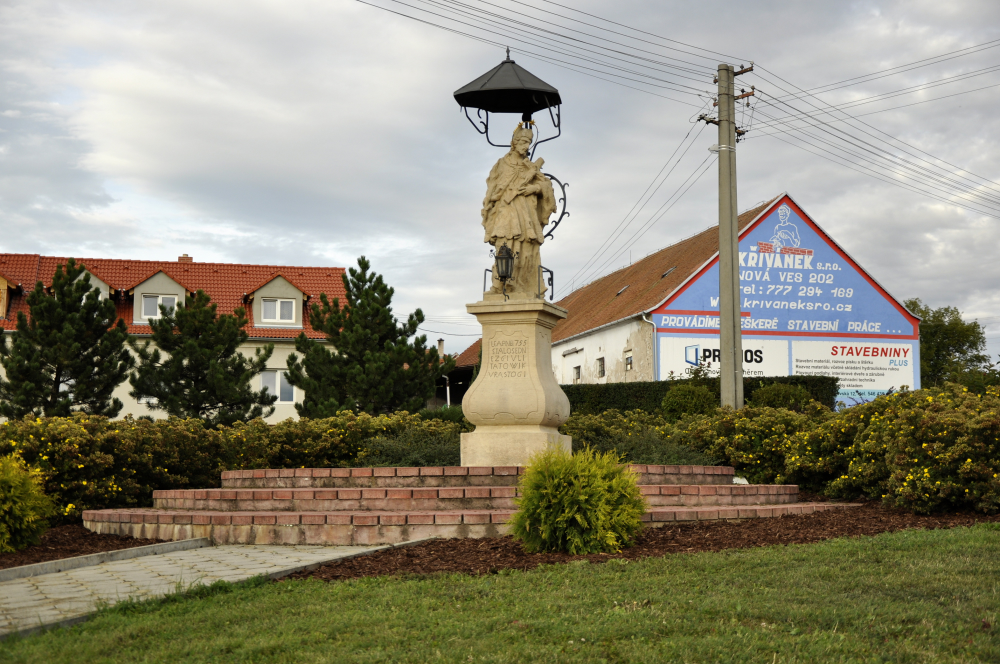 Socha sv. Jana Nepomuckého (Nová Ves), V část obce, Nová Ves